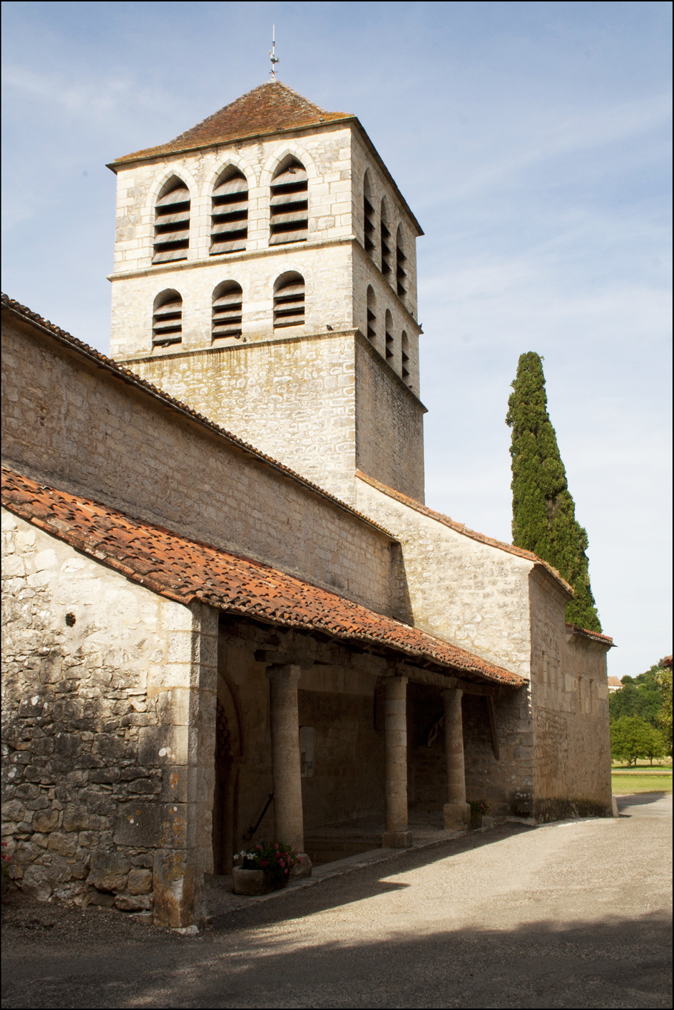 Eglise Saint-Pierre située à Caillac dans le Lot .